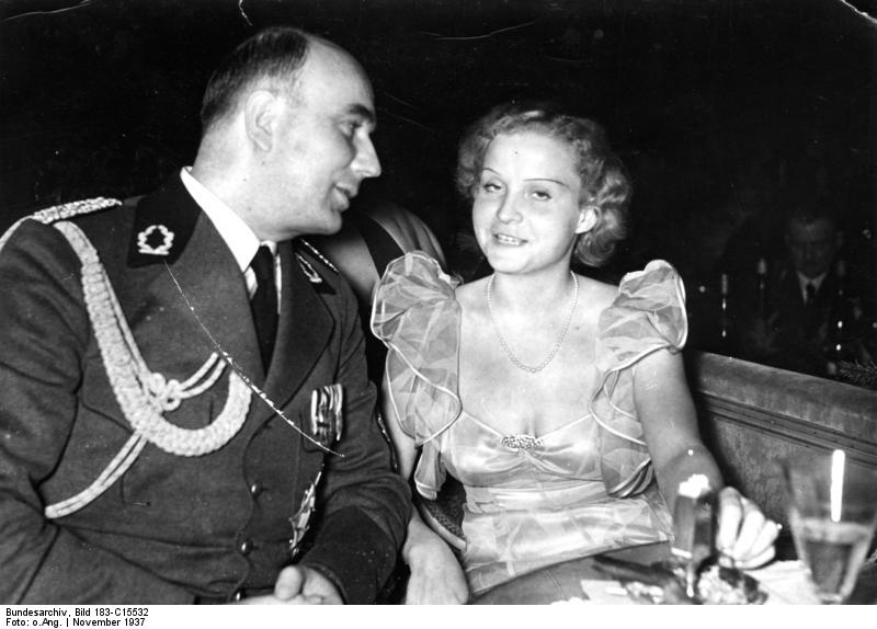 Arthur Greiser und Gattin Ball der deutschen Jägerschaft im Zoo. Senatspräsident Greiser und Frau Maria Körfer. Fot. Was 5.11.37 [Berlin.- Arthur Greiser mit Ehefrau Maria Körfer beim Ball der deutschen Jägerschaft im Zoo.] Abgebildete Personen: Greiser, Arthur: Senatspräsident von Danzig, Gauleiter Warthegau, Deutschland Körfer, Maria: die Gattin von Arthur Greiser